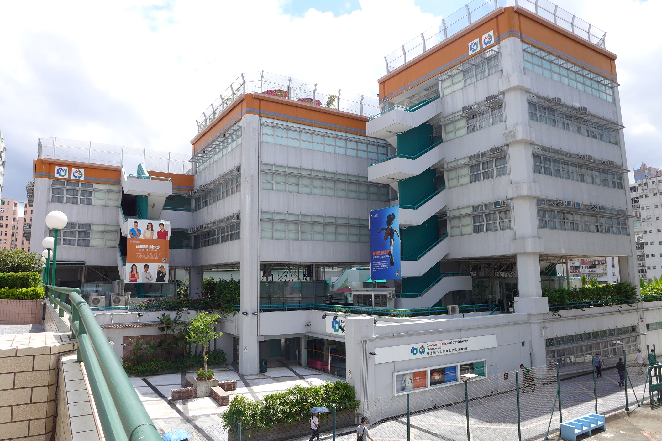 CCCU Telford Annex